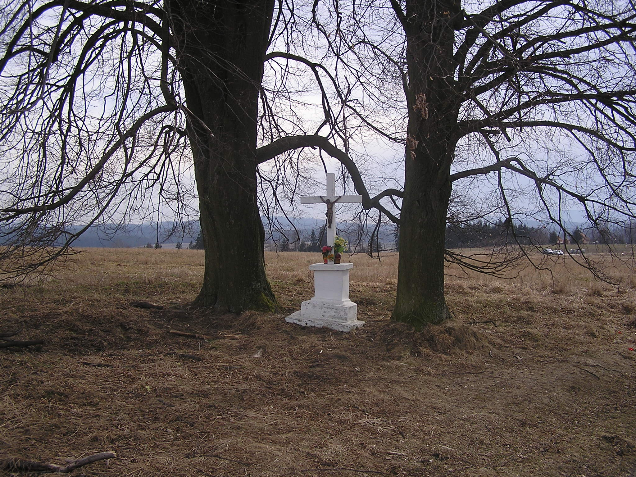 Křížek v polích